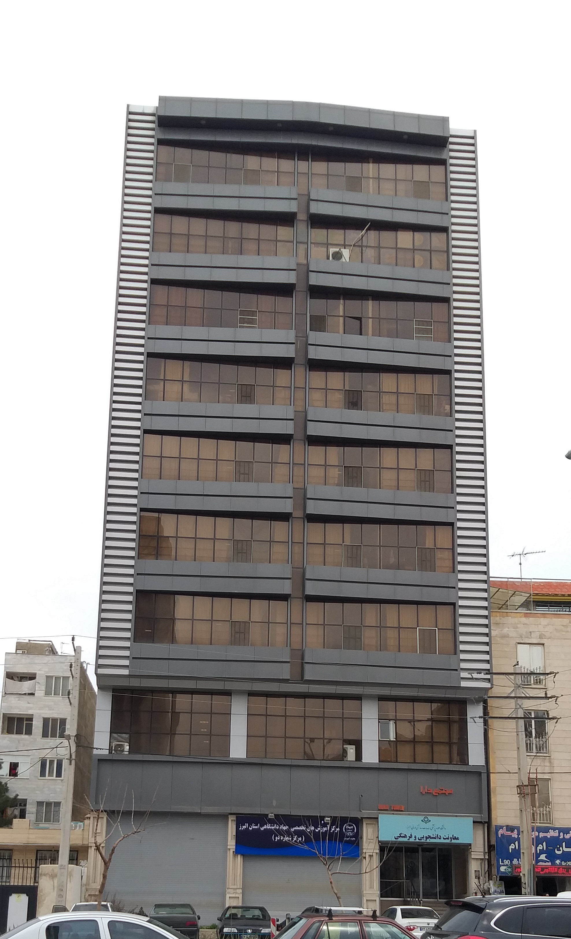 خوابگاه دارا دانشگاه علوم پزشکی البرز